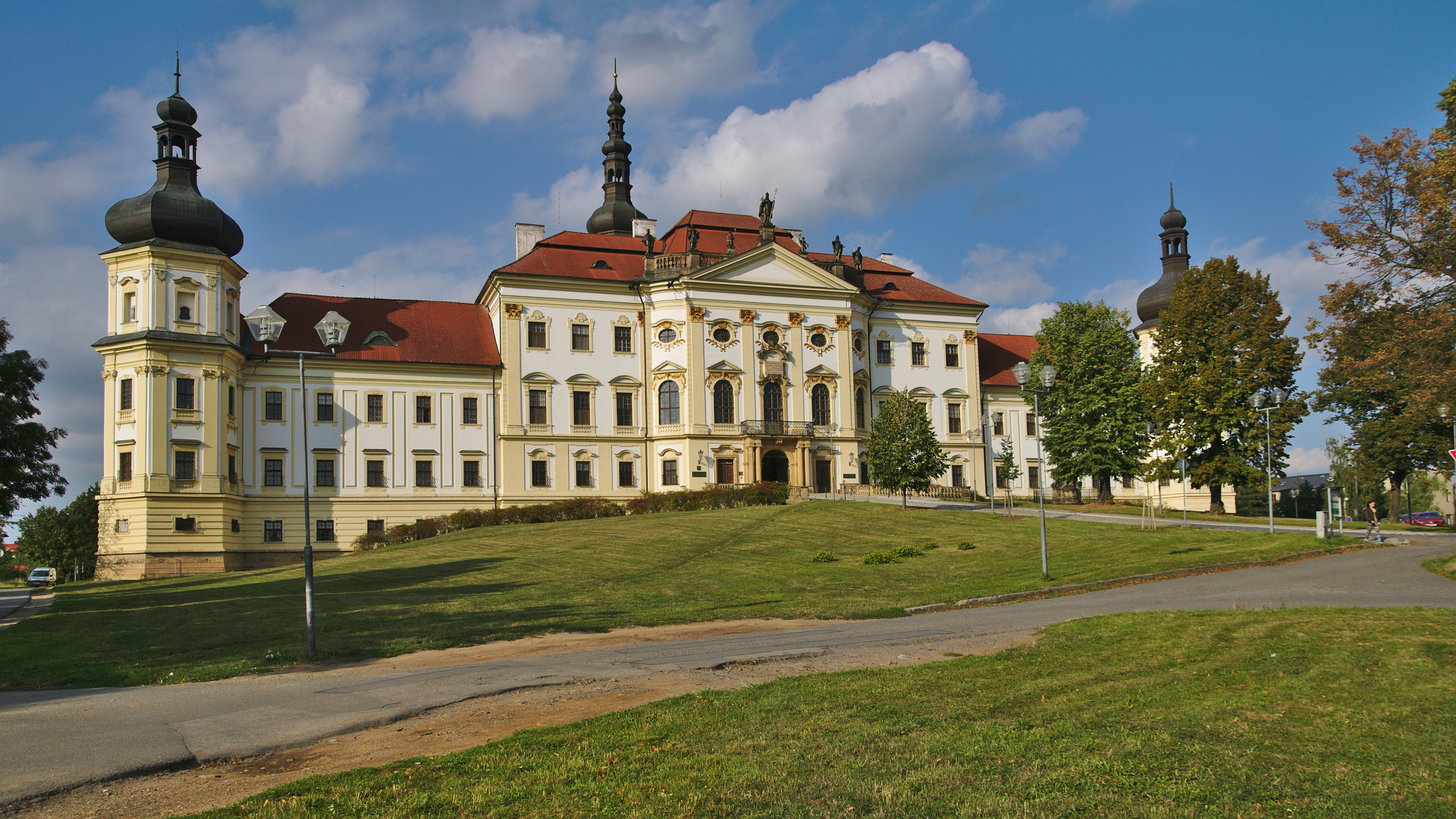 Klášterní Hradisko, Olomouc